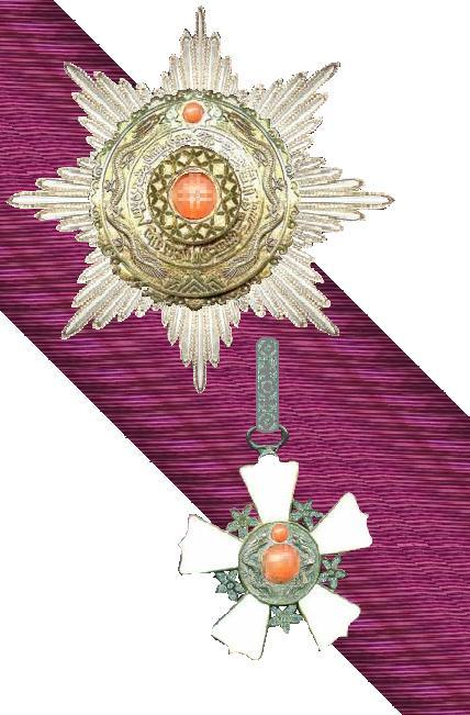 Eigen tekening